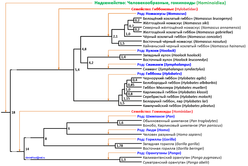 Филогенетическое дерево современных человекообразных обезьян. Цифры в узлах дерева показывают ориентировочное время расхождения филогенетических групп (млн лет) по данным молекулярной филогенетики. Все данные по на момент создания рисунка